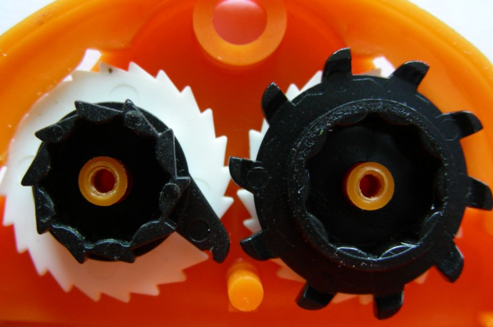 Stückzähler Innenansicht mit Getriebe